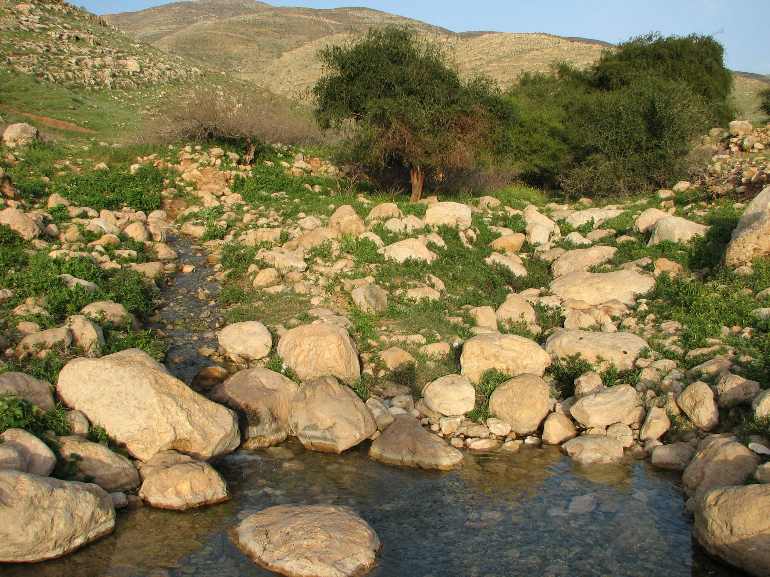 Fatzael Springs and ancient and modern water system in Fatzael Valley in the west side of Jordan Valley מעיינות פצאל נובעים בנחל פצאל חלק מבקעת פצאל בצידו המערבי של בקעת הירדן. בקעת פצאל היתה מיושבת עוד בתקופה הכלקוליתית. בתקופת הורדוס הוקם היישוב פצאליס אשר שכן בין היישוב פצאל ותומר של המאה ה20. לצורך ניצול המים הוקמה עוד בתקופות עתיקות מערכת אמת מים על צלע ההר אשר העבירה את המים מהמעיינות. ביציאה מואדי פצאל הוקמה בריכת אגירת מים המתוארכת לפחות לתקופת בית אומיה, ויש השערות שעתיקותה מגיעה גם לתקופתו של הורדוס. נמצאו אבנים הרודיניות בתחתית הקיר של בריכת האגירה נקודת נביעה של אחד המעעינות ובריכת המים